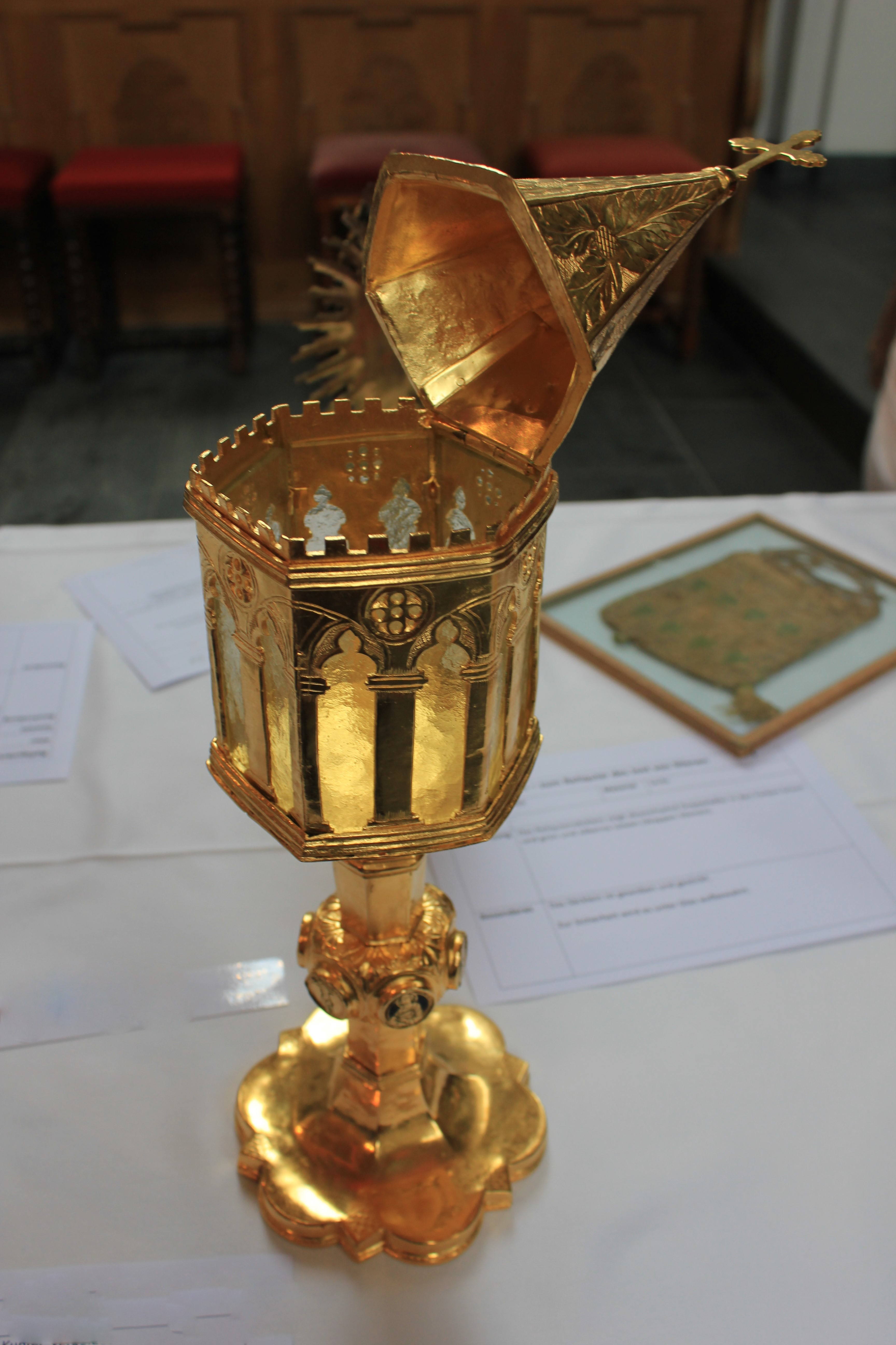 Ostensorium für Reliquien, entstanden um 1300, aus Kupfer, vergoldet. Es gehört zu den Kulturgütern der Pfarrkirche in Küssnacht SZ.